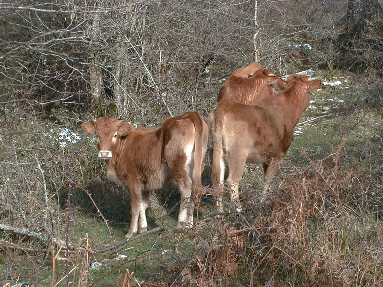 Betizu gazteak Baraibarren, Nafarroa.